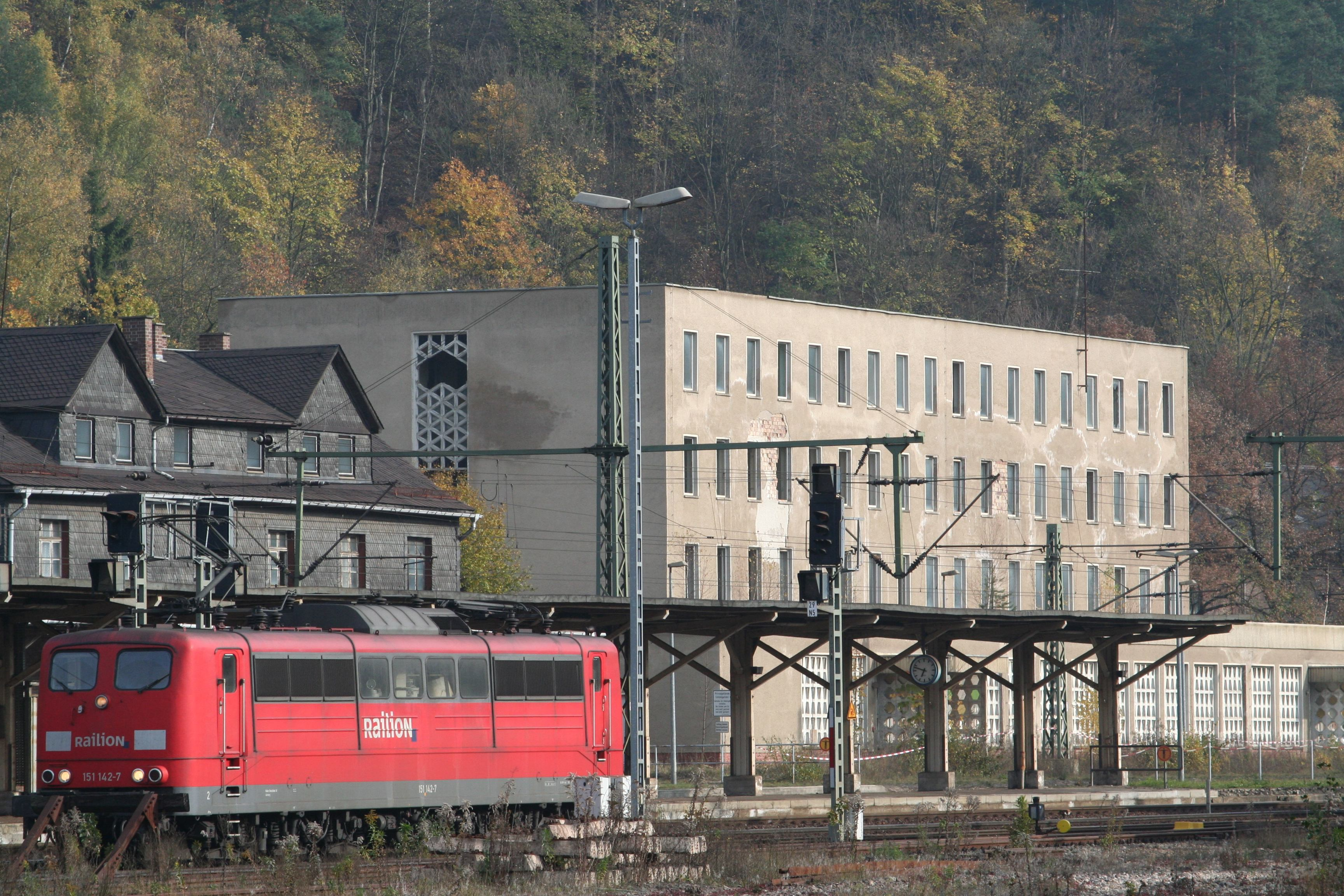 Bahnhof Probstzella in Südthüringen